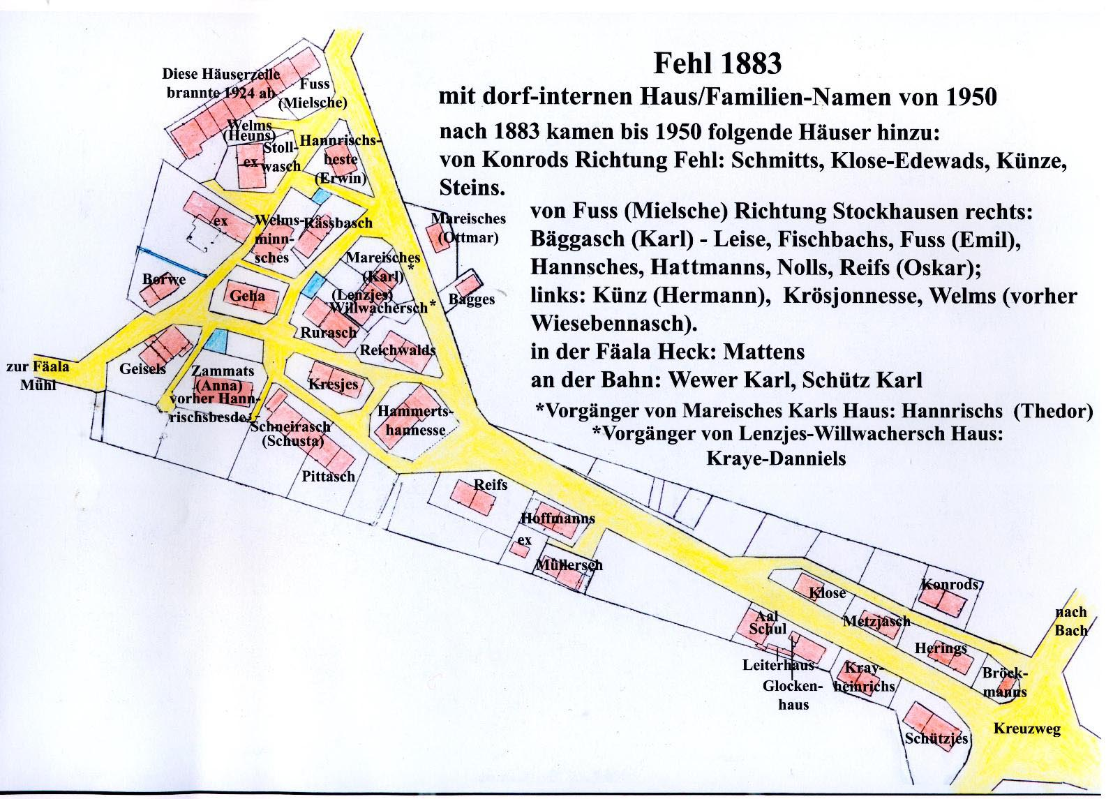 Hausnamen im Ortsteil Fehl von Fehl-Ritzhausen